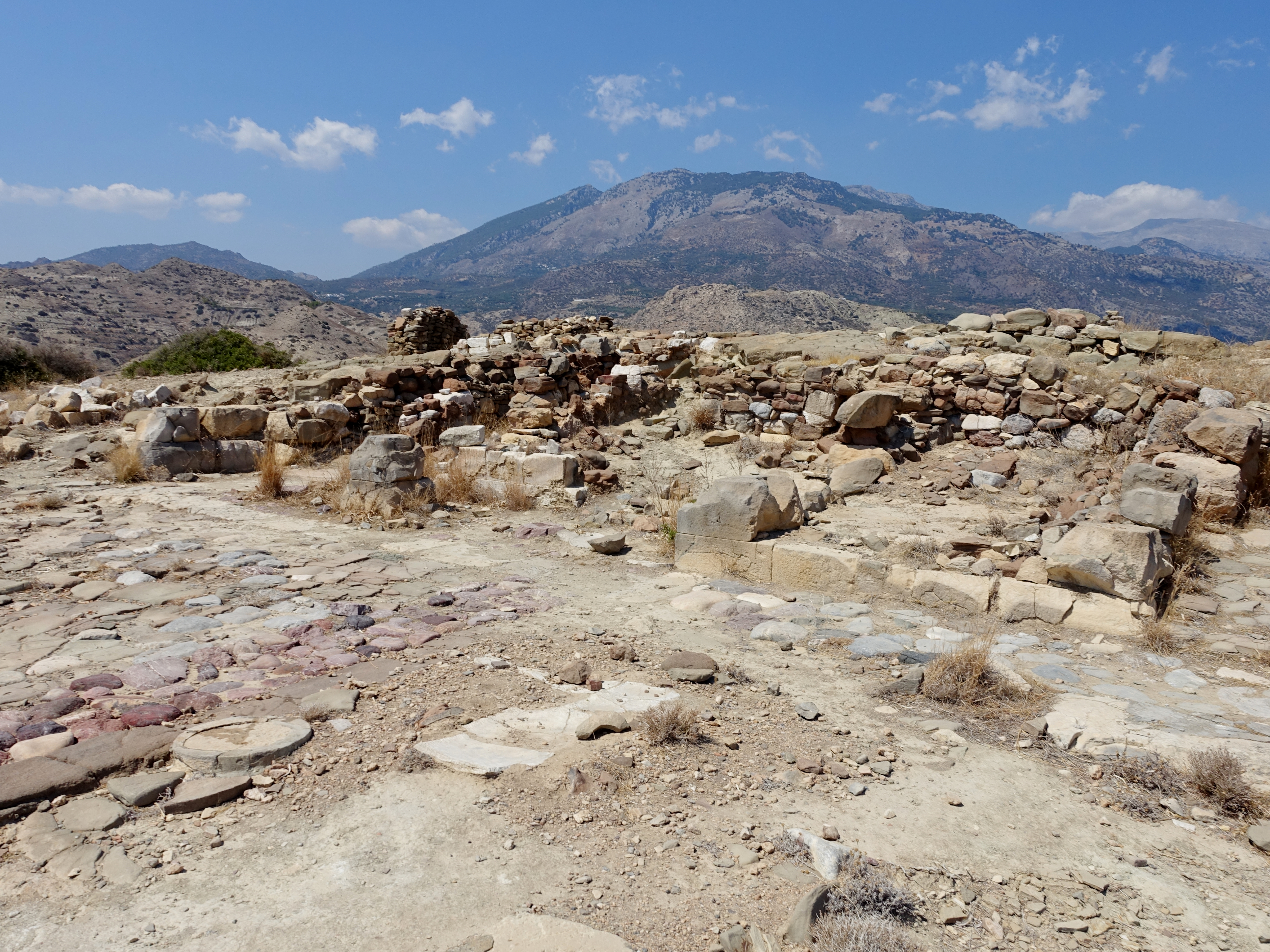 Ausgrabungsstätte von Pyrgos bei Myrtos, Kreta, Griechenland